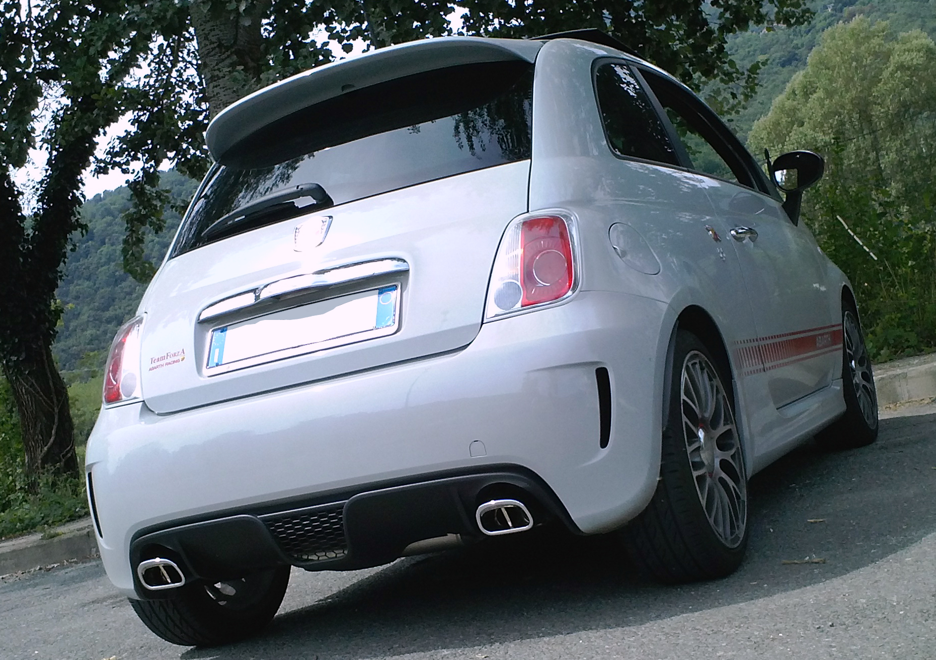 Record_Modena_Scarichi_Kit_Elaborazione_595_Abarth